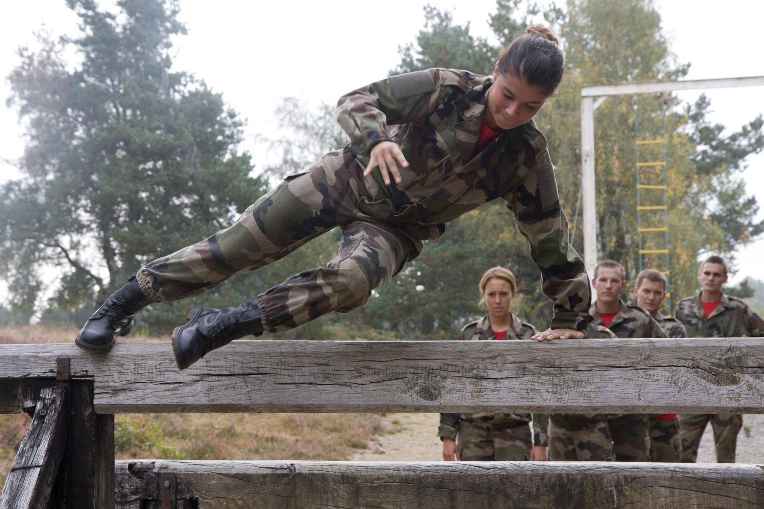 École polytechnique, élèves pendant la formation militaire initial au camp militaire de La Courtine.